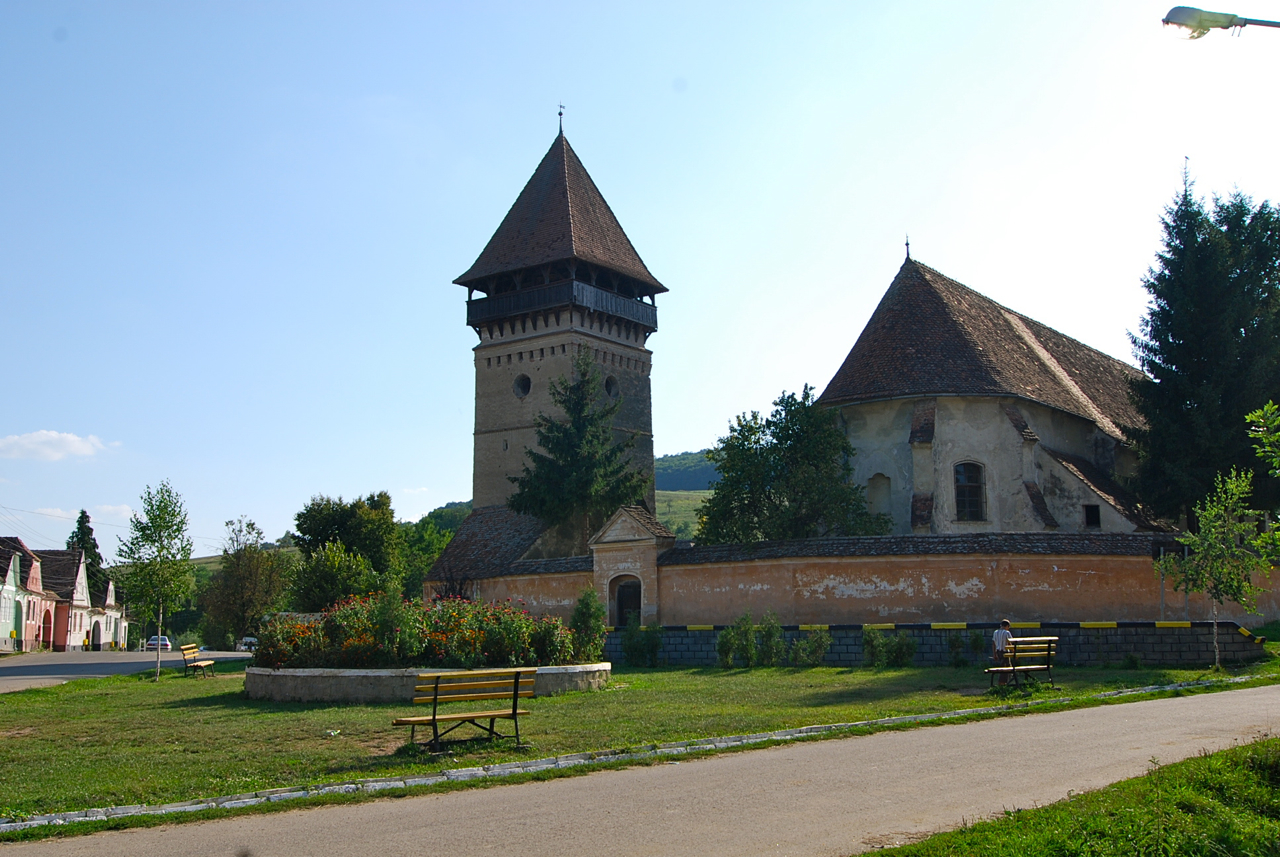 Die Kirchenurg von Großalisch (Seleuş (Daneş))